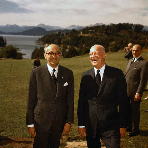 Es el presidente Frondizi con el presidente estadounidence Eisenhower en Bariloche en febrero de 1960.